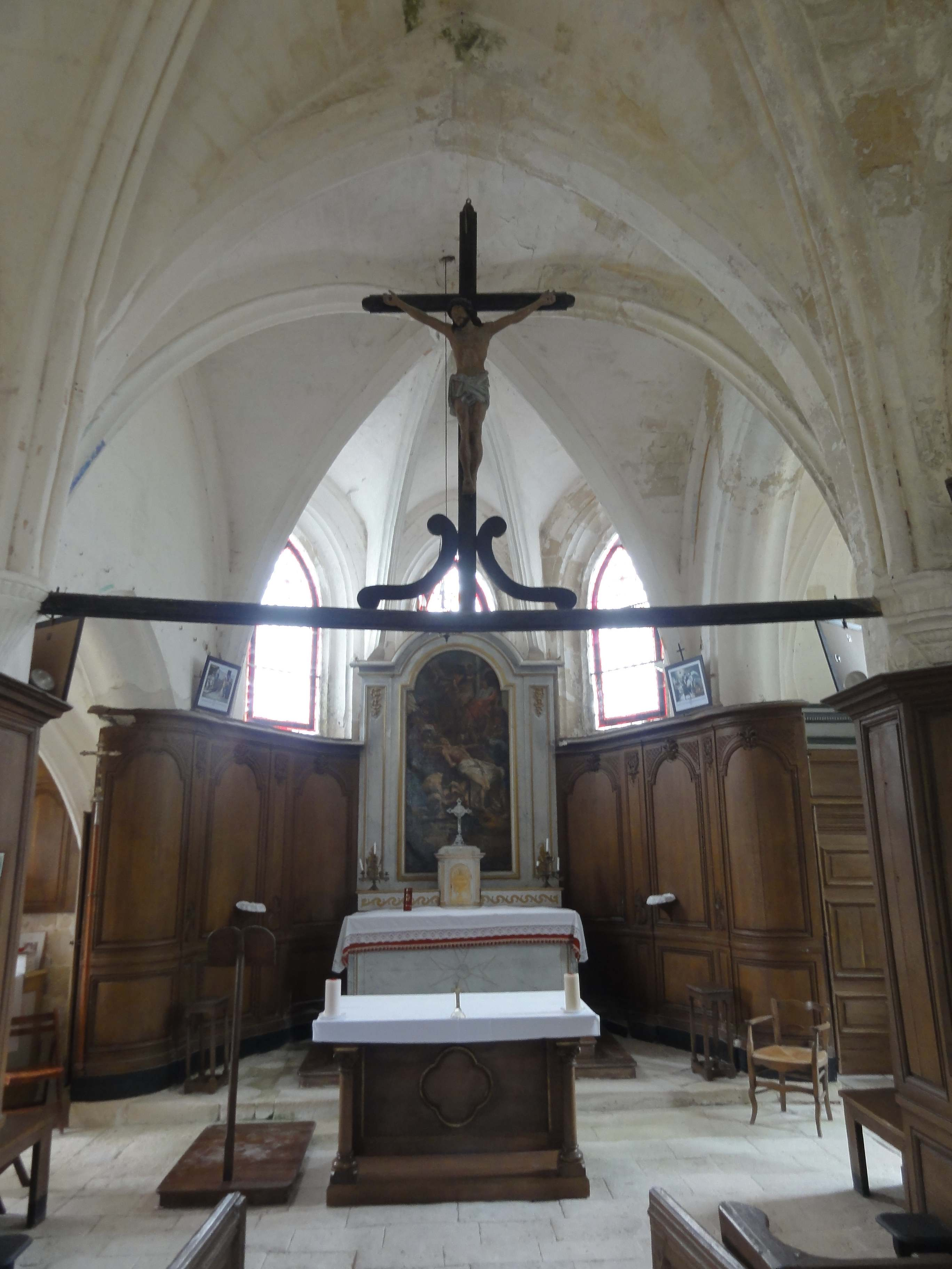 Intérieur de l'église (voir titre).